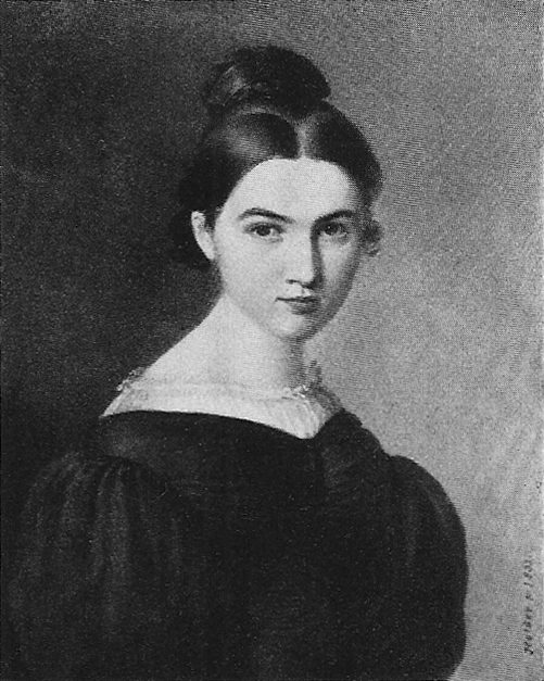 Friedericke Hofmann [Braut von Christian Märklin] (Elfenbeinminiatur 100×79 mm